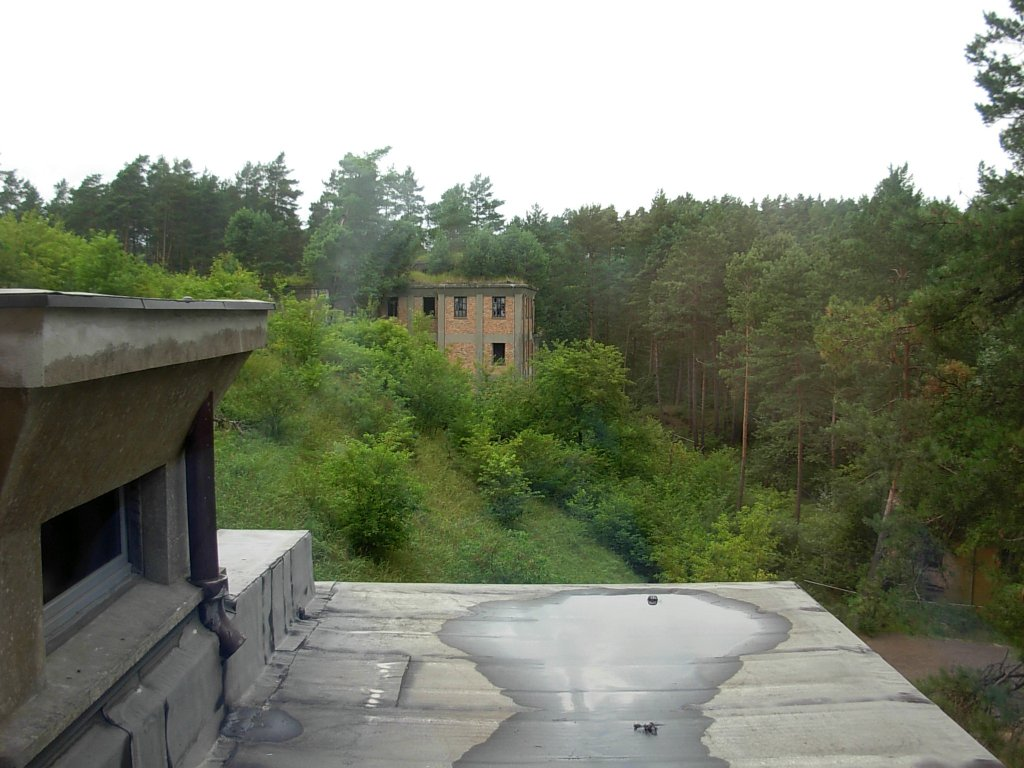 Eksploseum w Bydgoszczy - widok z okna budynku